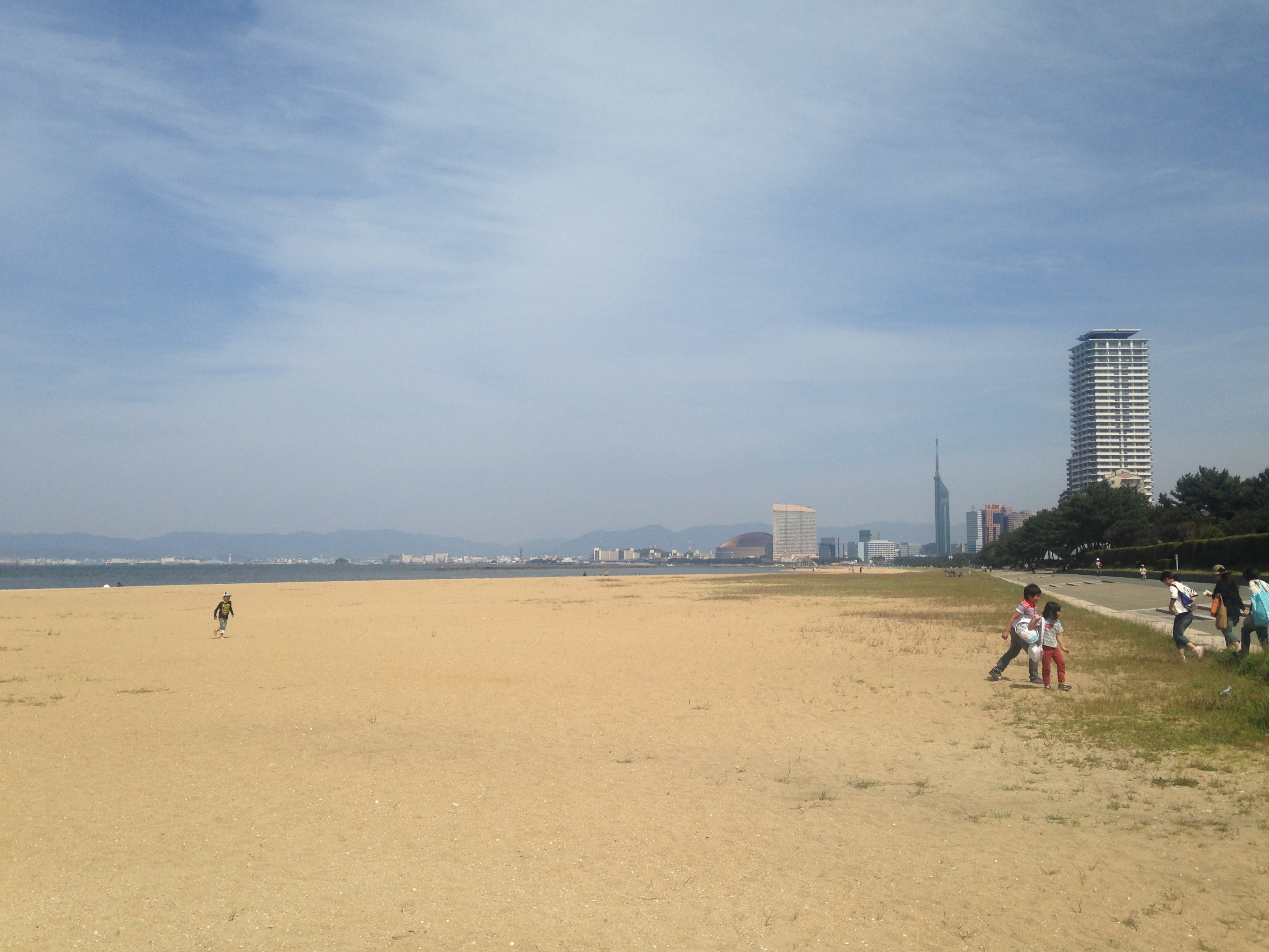 福岡市西区愛宕浜より東側への展望